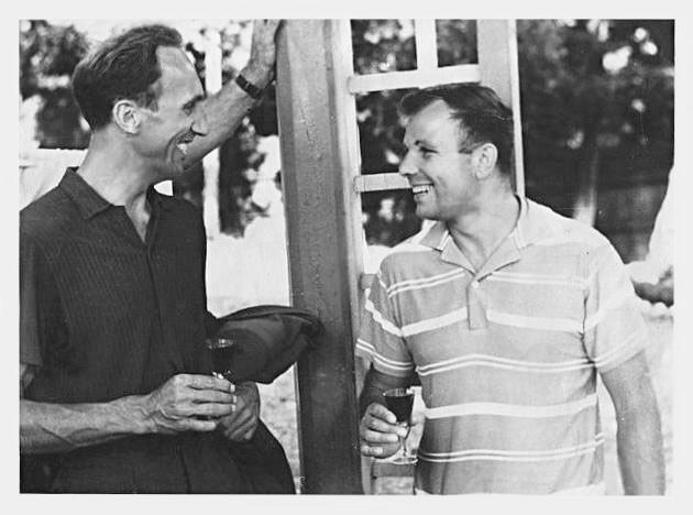 встрече с Юрием Гагариным, март 1962 года, Крым